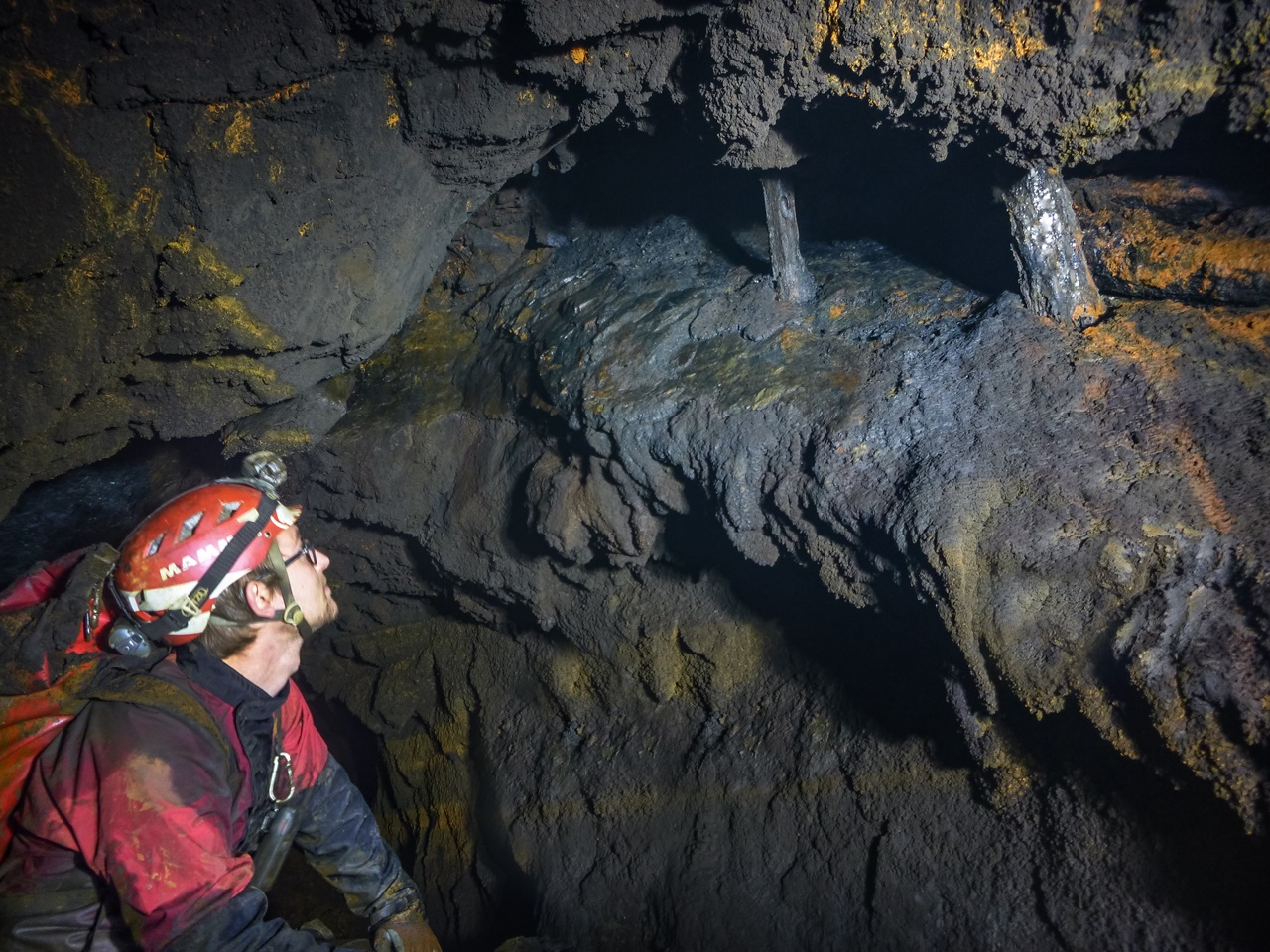 Abgebaute Gangspalte